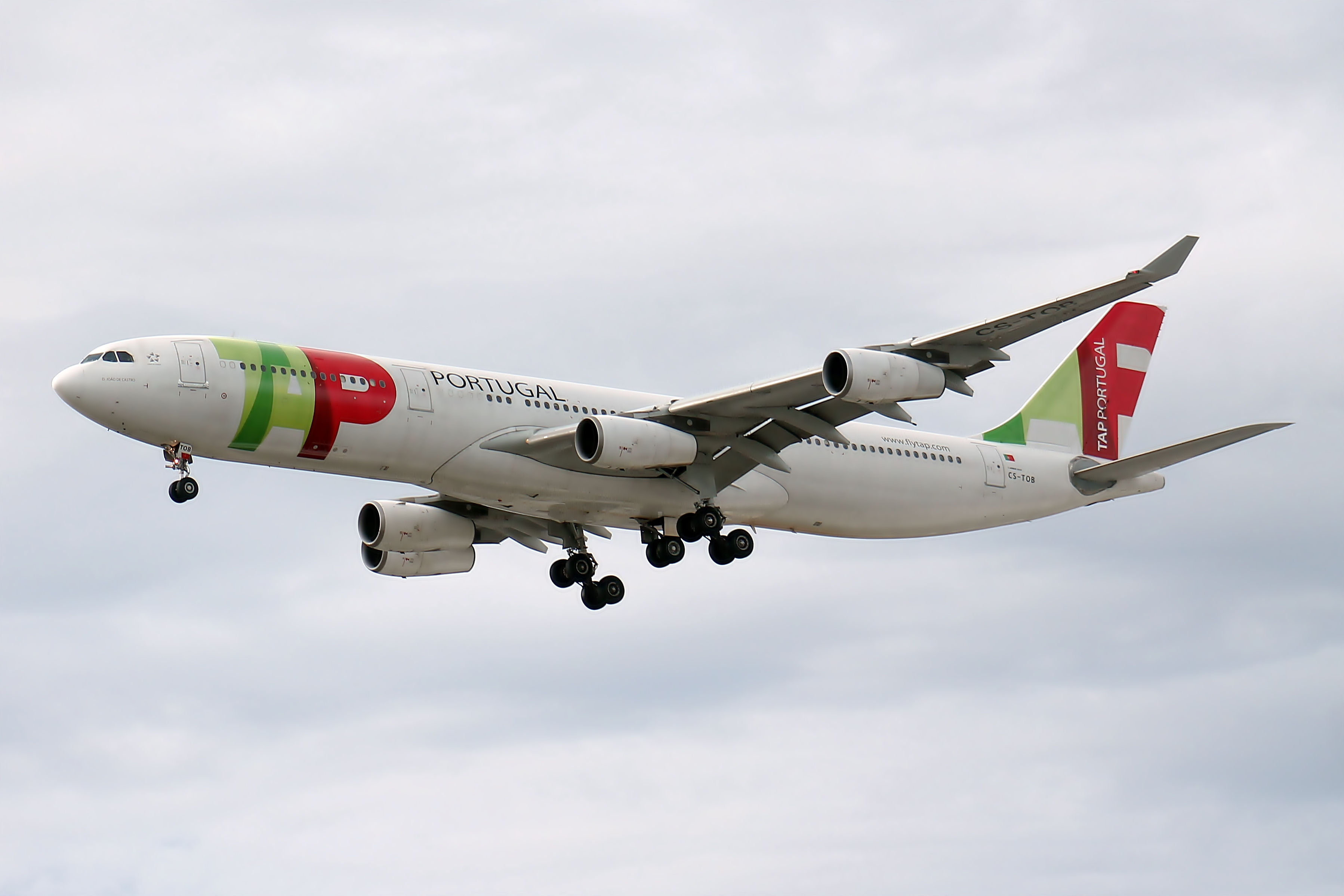 A340-300 TAP SBGR